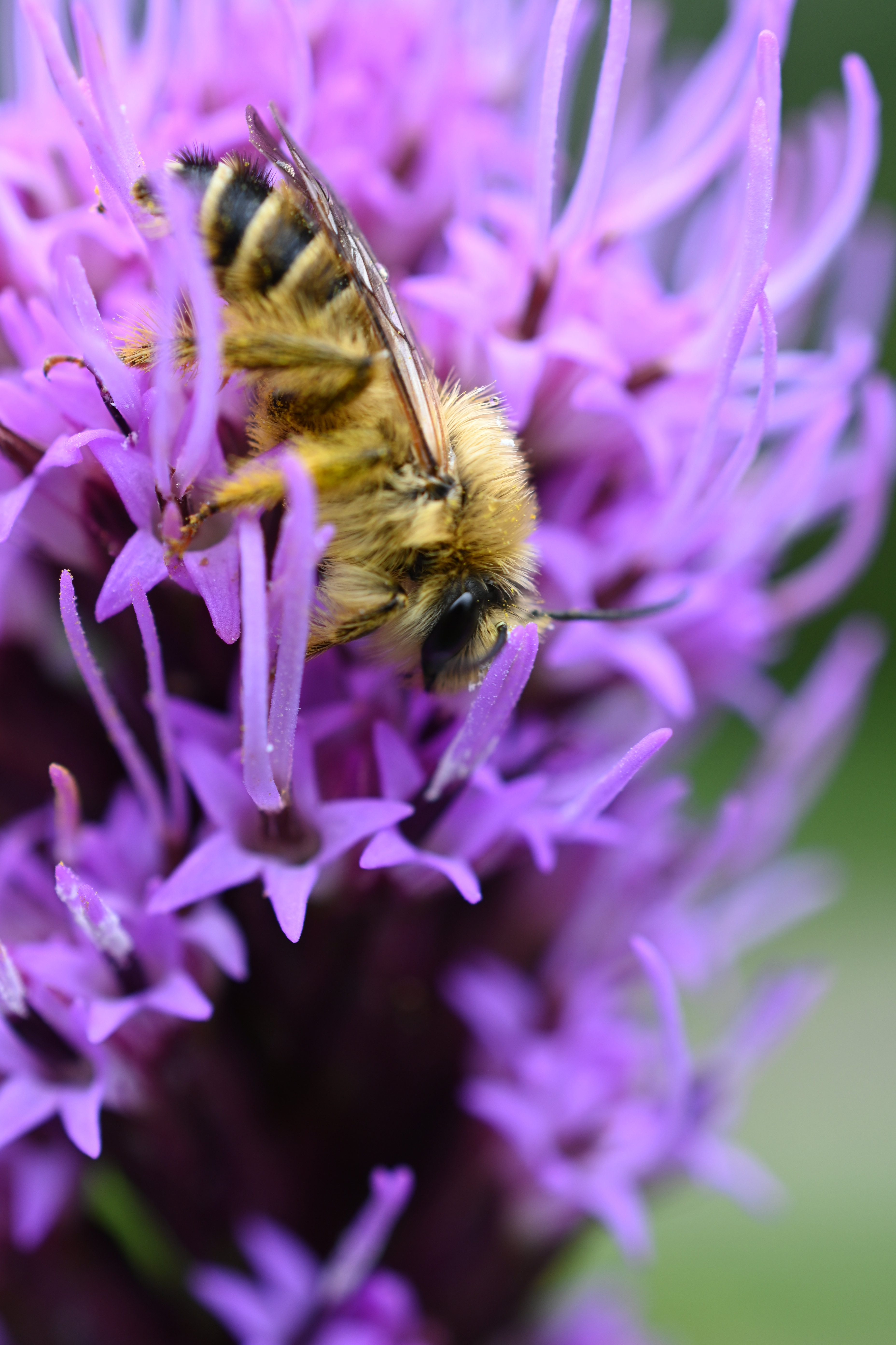 Männchen der Dasypoda hirtipes im Botanischen Garten Rostock